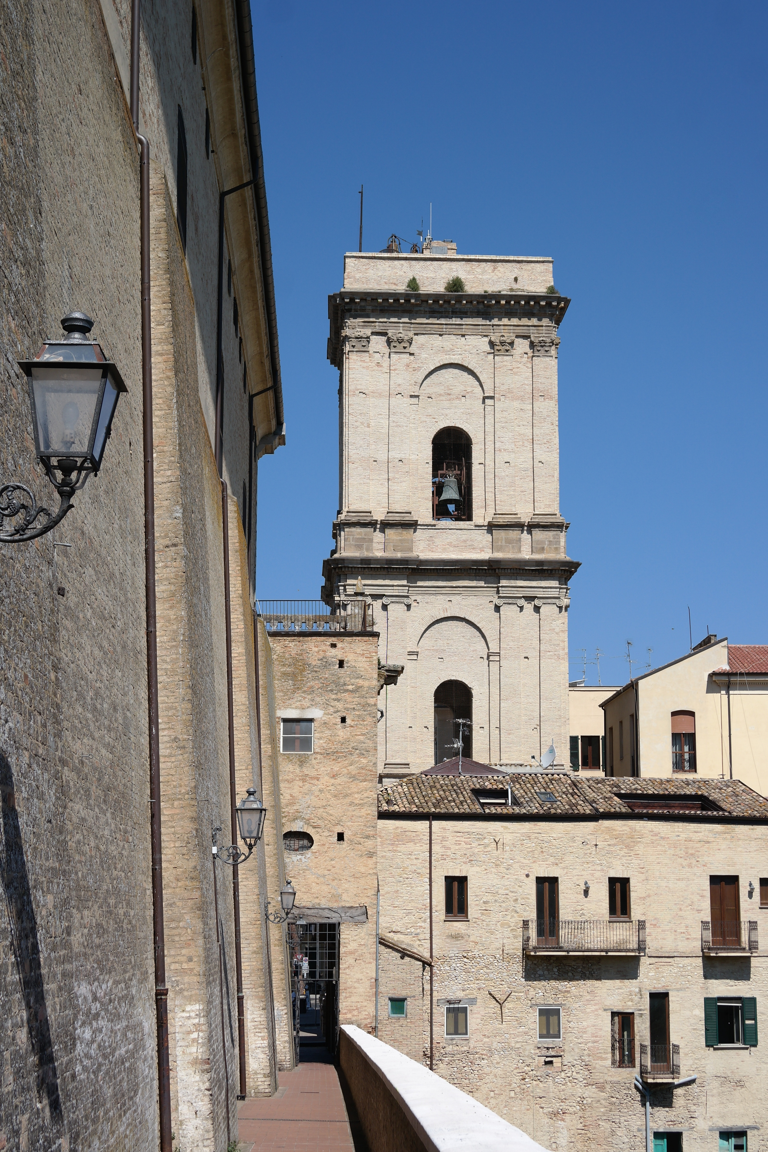 Campanile del Duomo di Lanciano dal ponte di Diocleziano